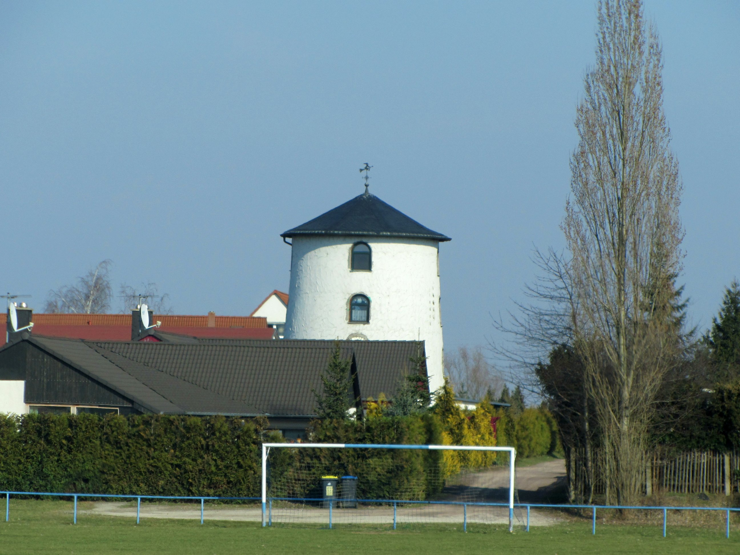 Knapendorf,Windmühle